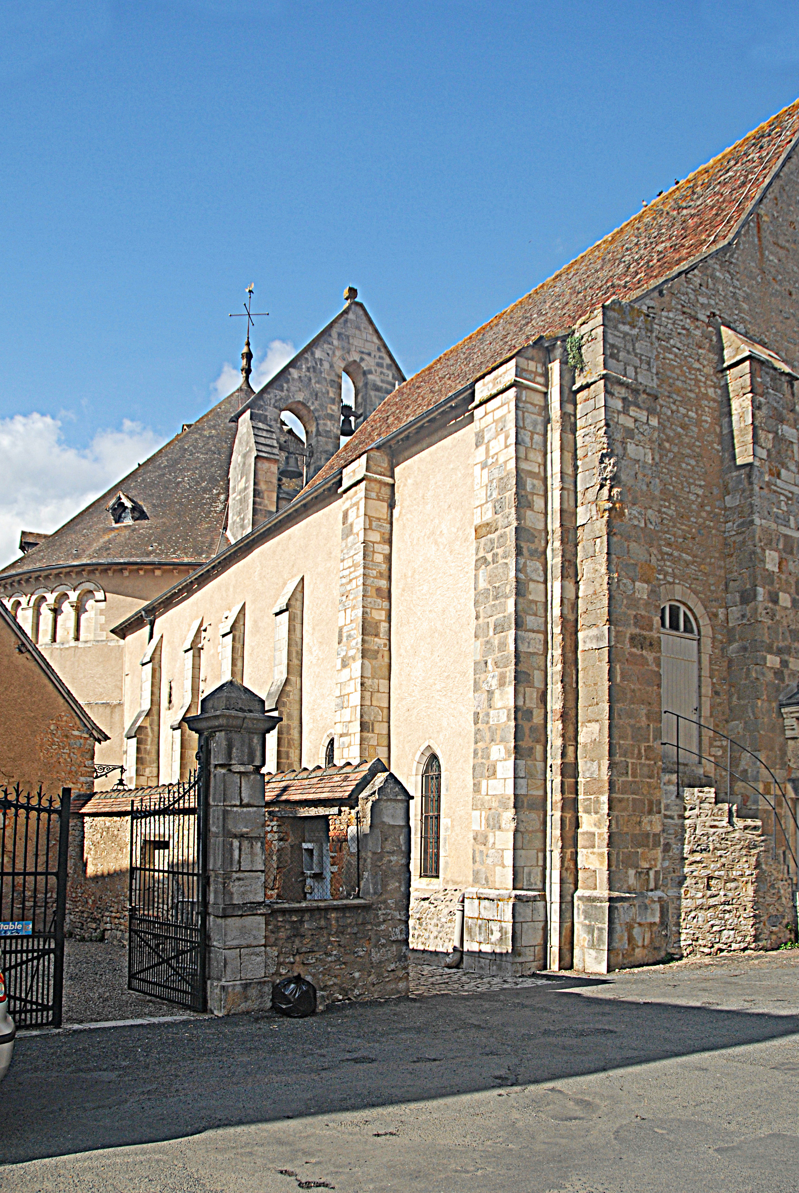 Neuvy_St.-Sépulcre, Stiftskirche, SW-Seite von S